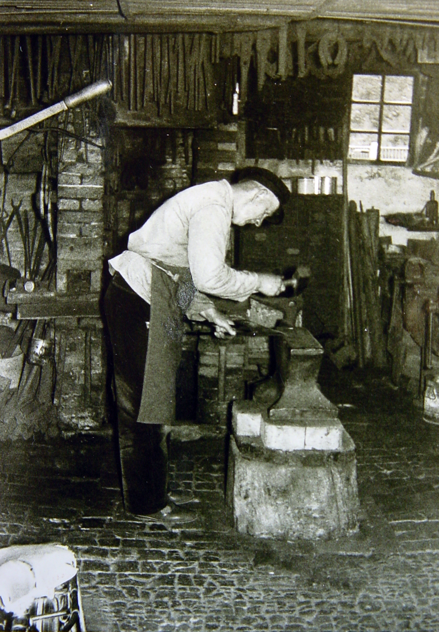 Hofschmied Johann Göken am Amboss in der Uplewarder Schmiede